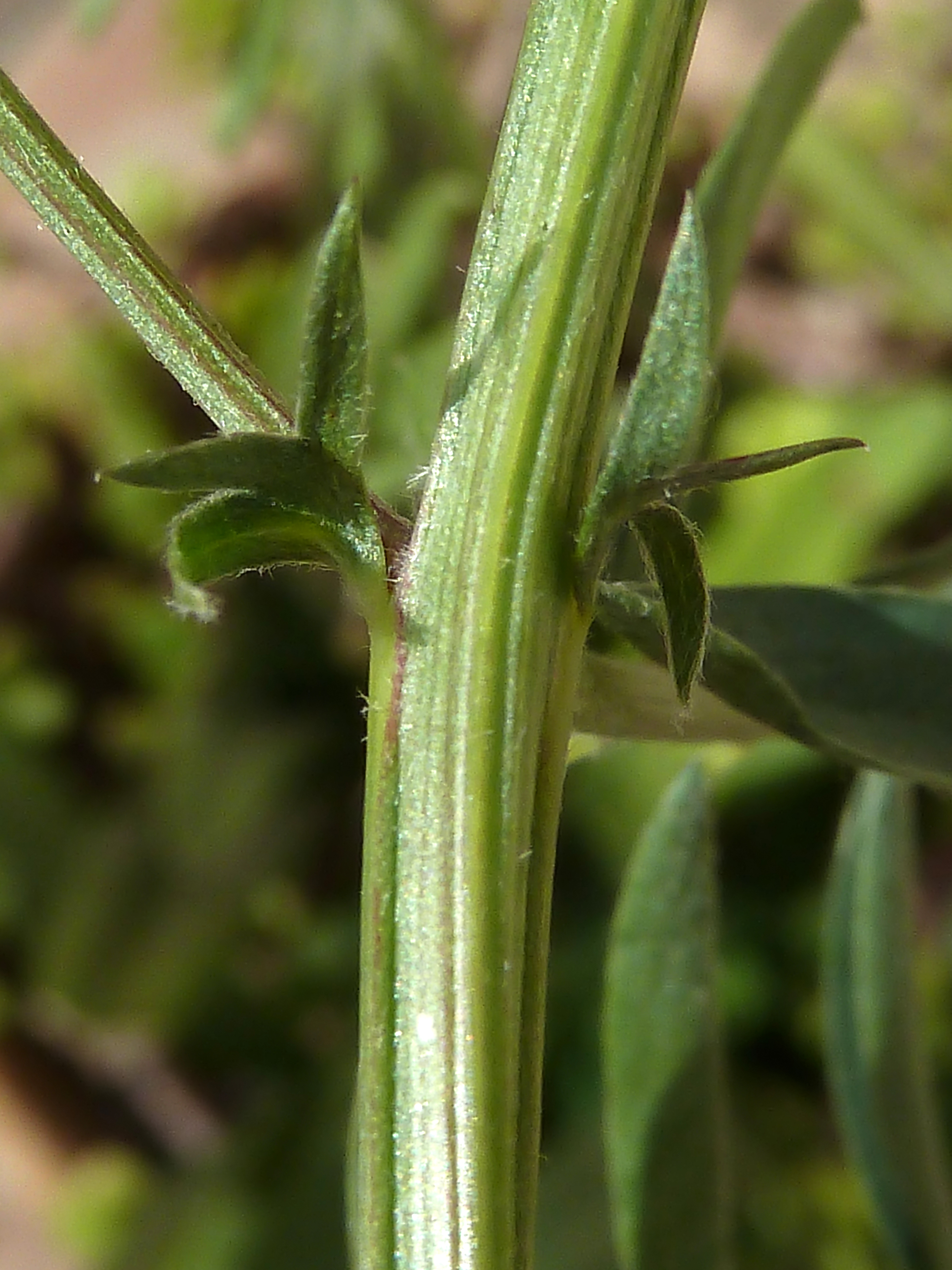 Vicia monantha (Algarroba) - Hojas: estípulas. - Camino del Canalillo, Albatera (Provincia de Alicante, España).